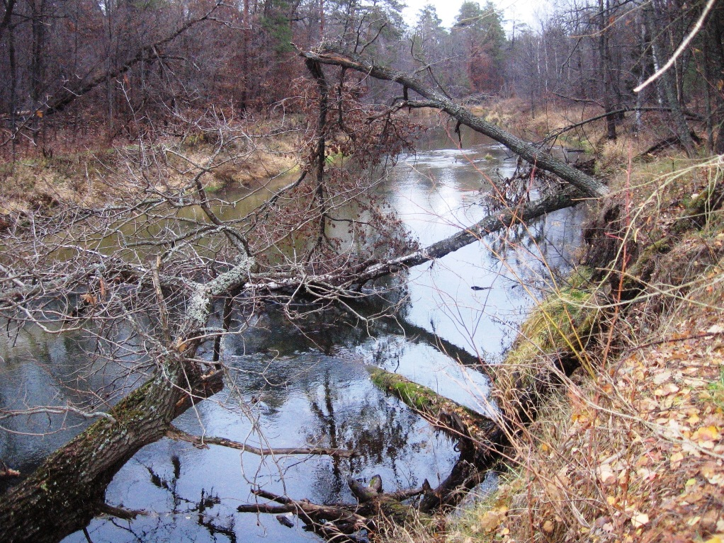 Серёжа